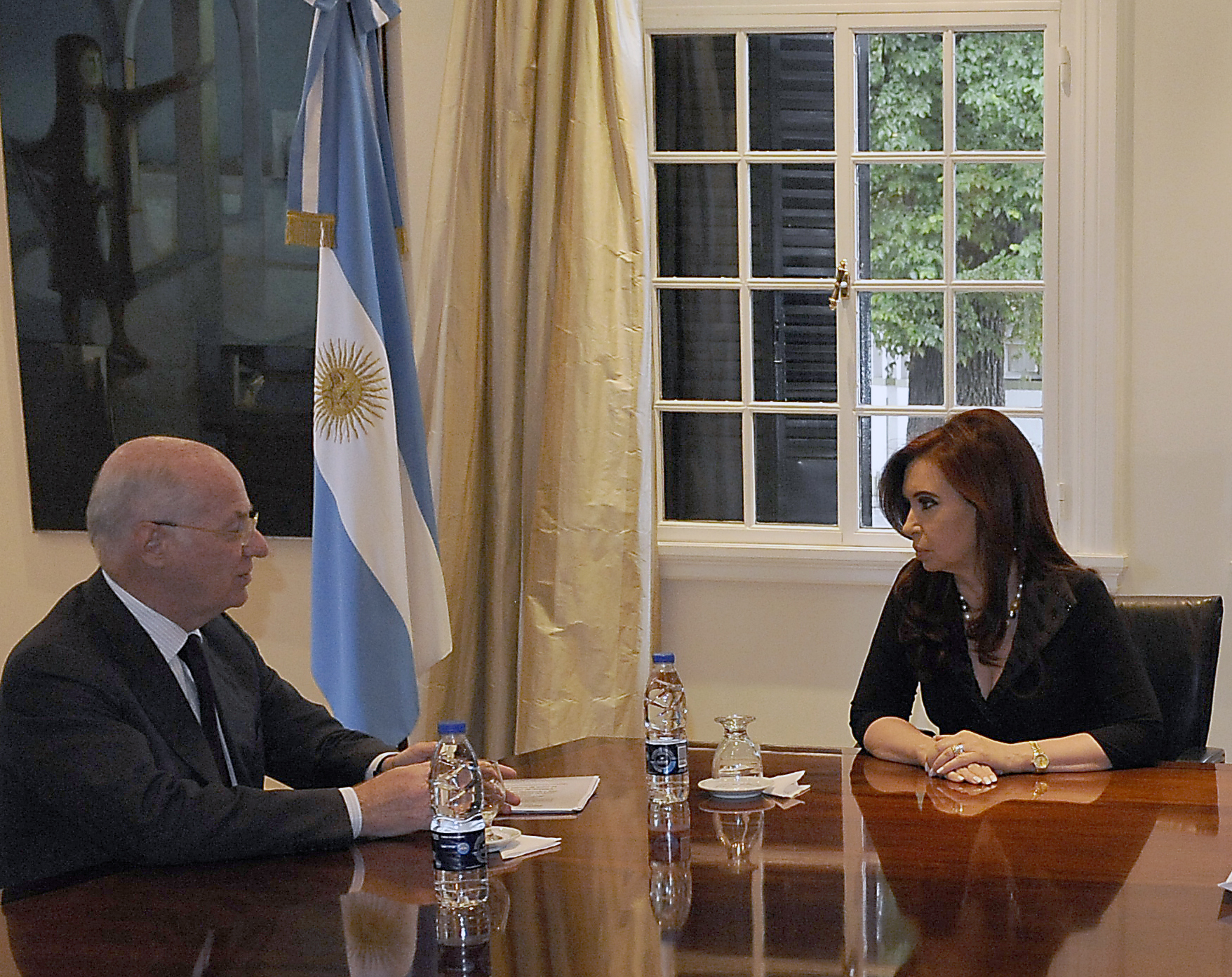 La presidenta Cristina Fernández dialoga con el titular del Grupo Techint, Paolo Rocca, durante una audiencia en la Residencia presidencial de Olivos.